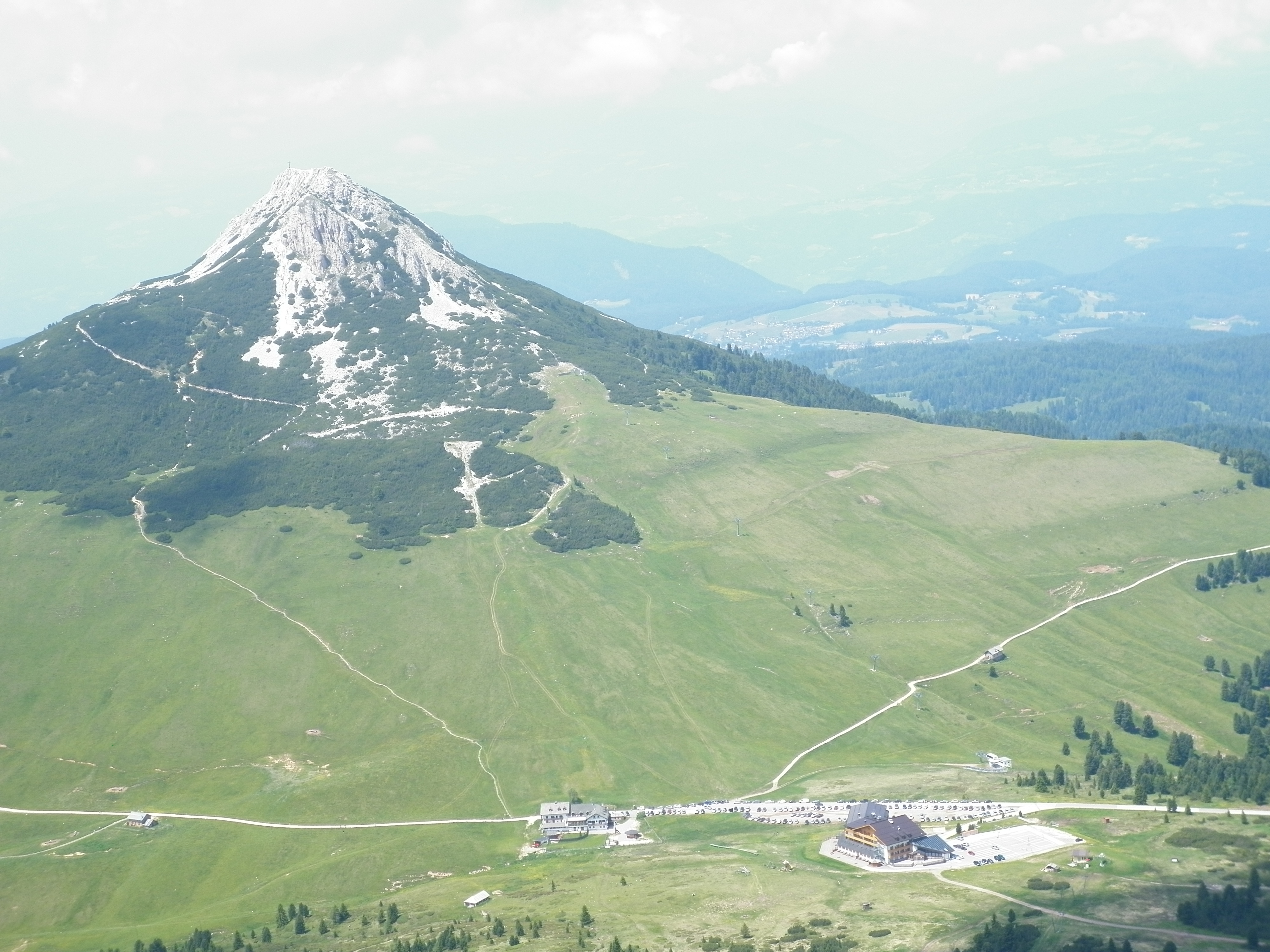 Jochgrimm und Weißhorn